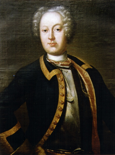 Portrait of Jürgen Johann von Stackelberg (1697-1766)